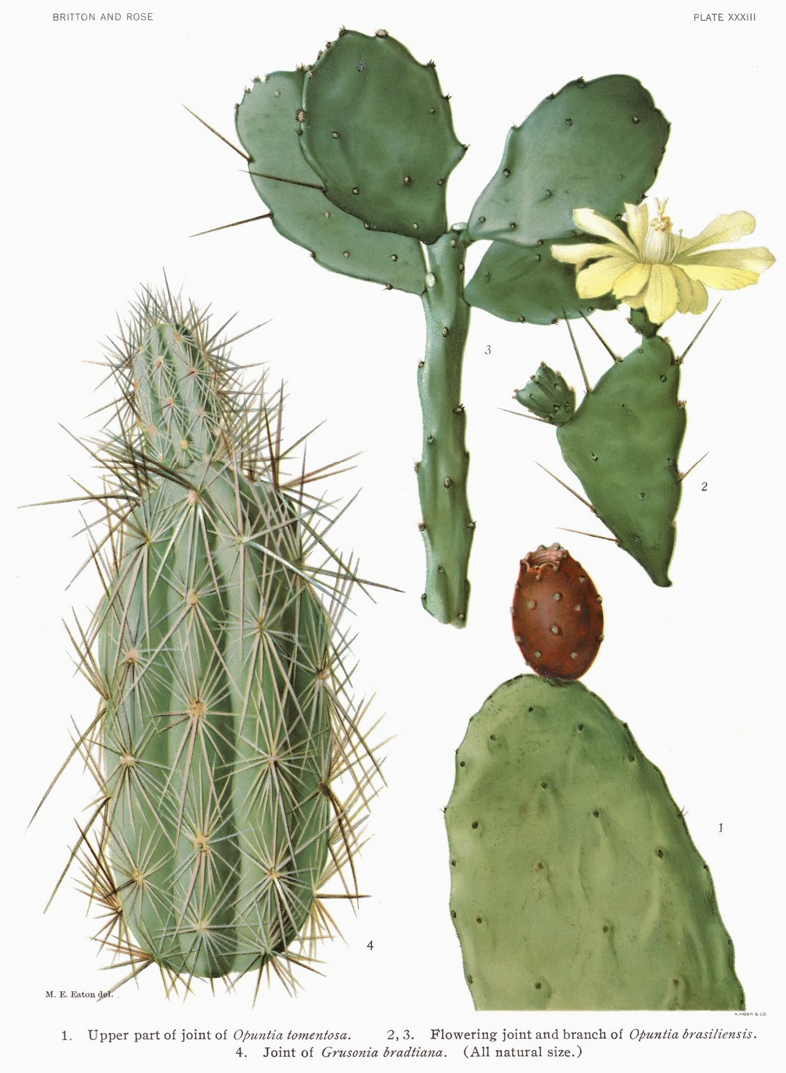 1 Opuntia tomentosa, 2,3 Brasiliopuntia brasiliensis, 4 Grusonia bradtiana.